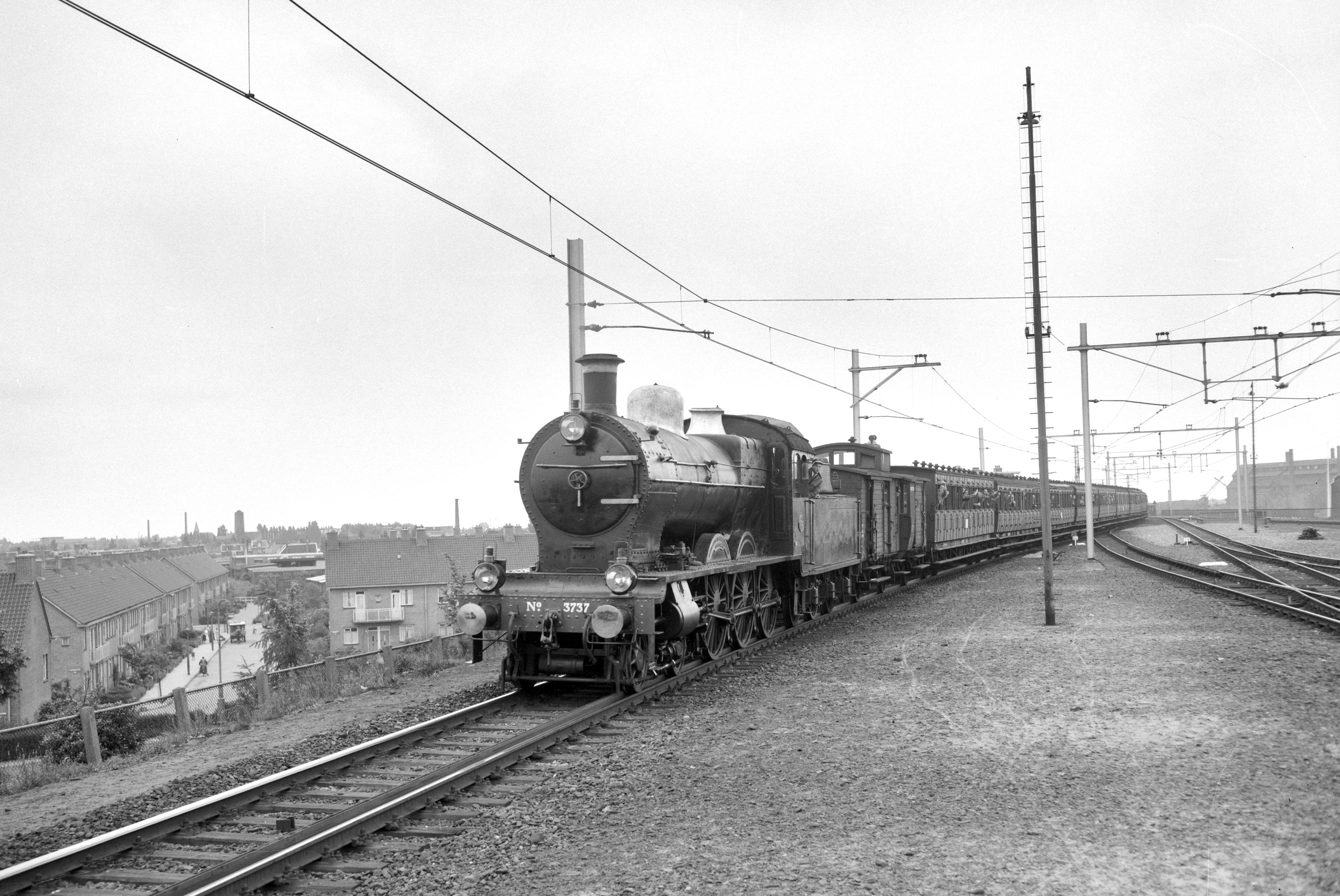 Collectie / Archief : Fotocollectie Anefo Reportage / Serie : [ onbekend ] Beschrijving : Viering 25 jaar Nederlandse Vereniging van Belangstellenden in Spoor- en tramwezen (NVBS). Stoomlocomotief NS 3737 met houten rijtuigen nadert het Amstelstation in Amsterdam. Datum : 16 juni 1956 Trefwoorden : spoorwegen, stoomlocomotieven Fotograaf : Bilsen, Joop van / Anefo Auteursrechthebbende : Nationaal Archief Materiaalsoort : Negatief (zwart/wit) Nummer archiefinventaris : bekijk toegang 2.24.01.04 Bestanddeelnummer : 907-8284